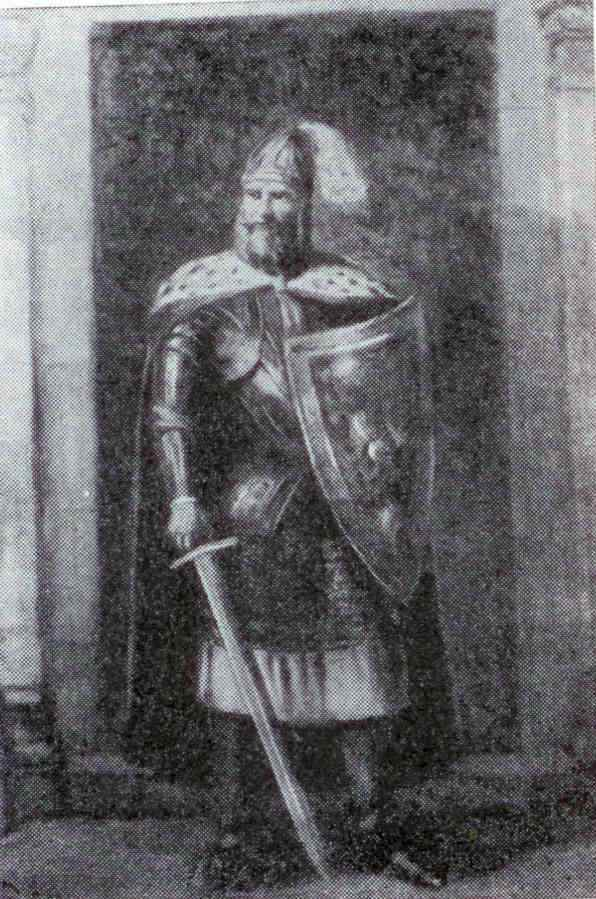 Скан иллюстрации из книги "История городов и сел УССР" Львовская область.Главная редакция украинской советской энциклопедии. К.1978